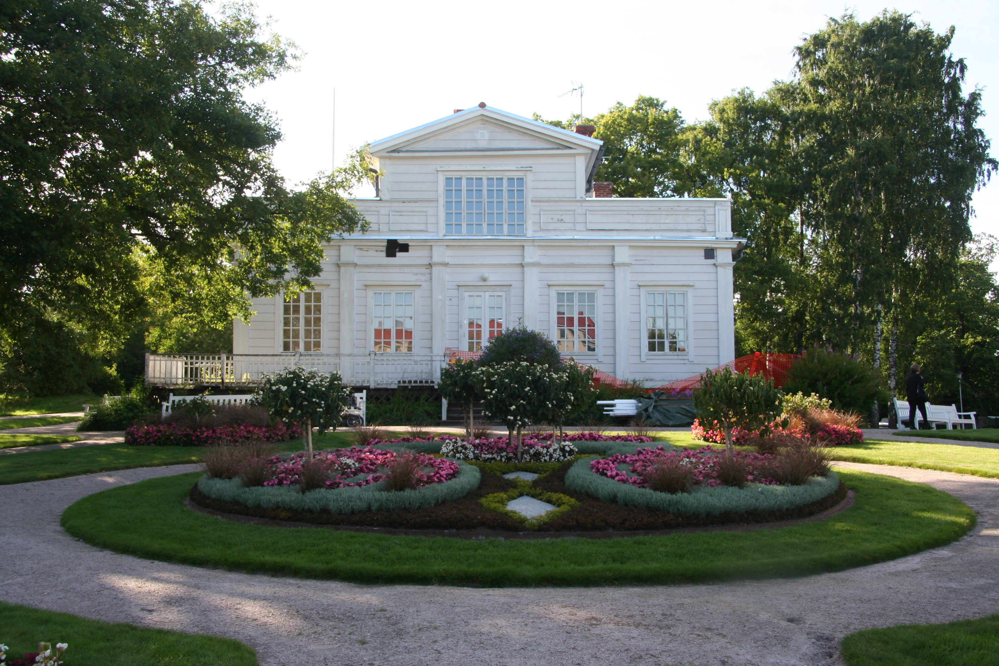 Annalan huvila, Helsinki